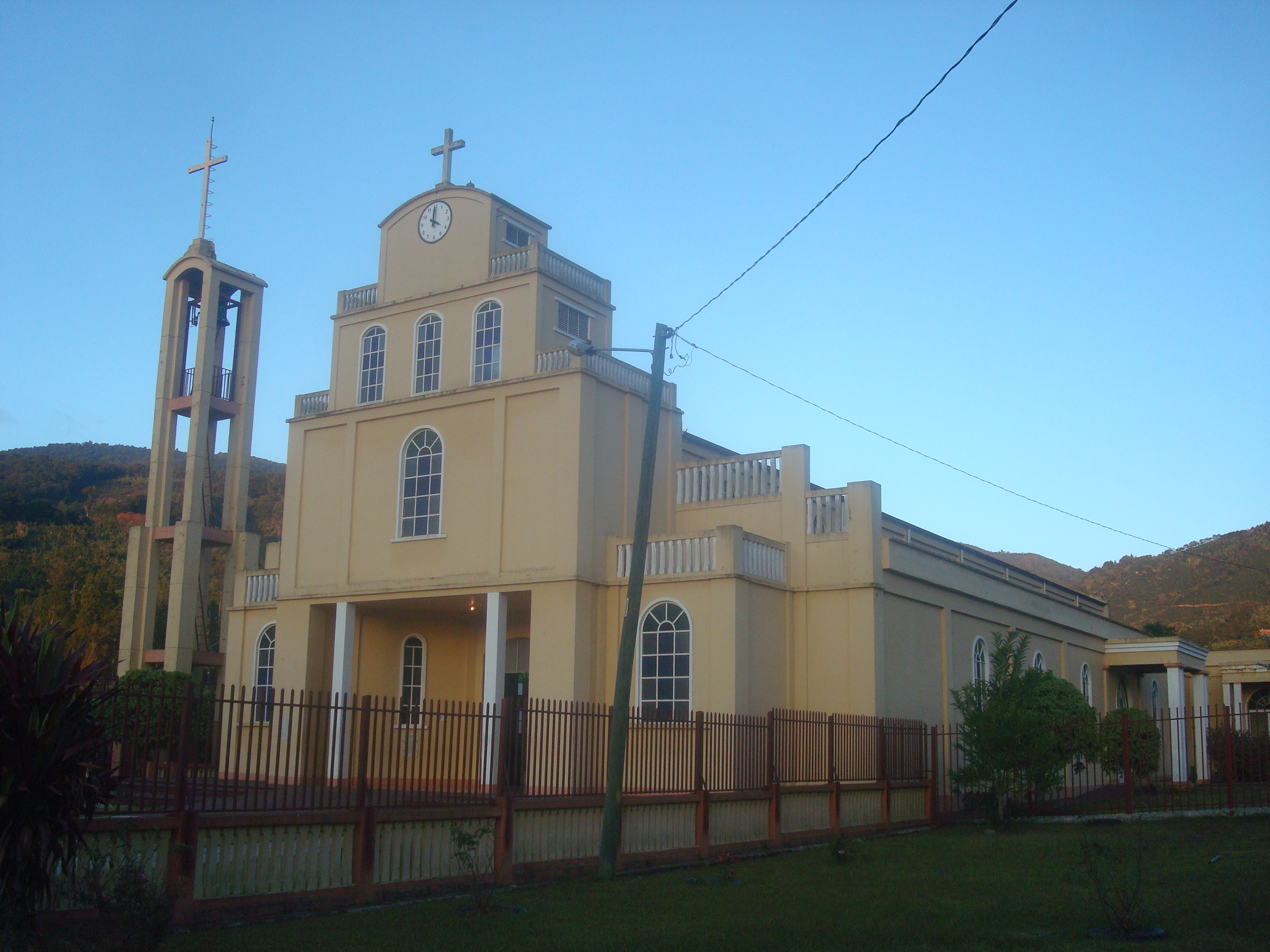 Templo católico de Santa María de Dota, Costa Rica.